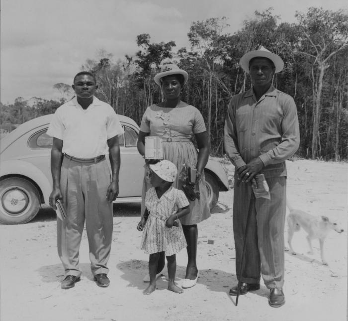 Negatief. Portret van een groep Marrons uit Nieuw Ganzee